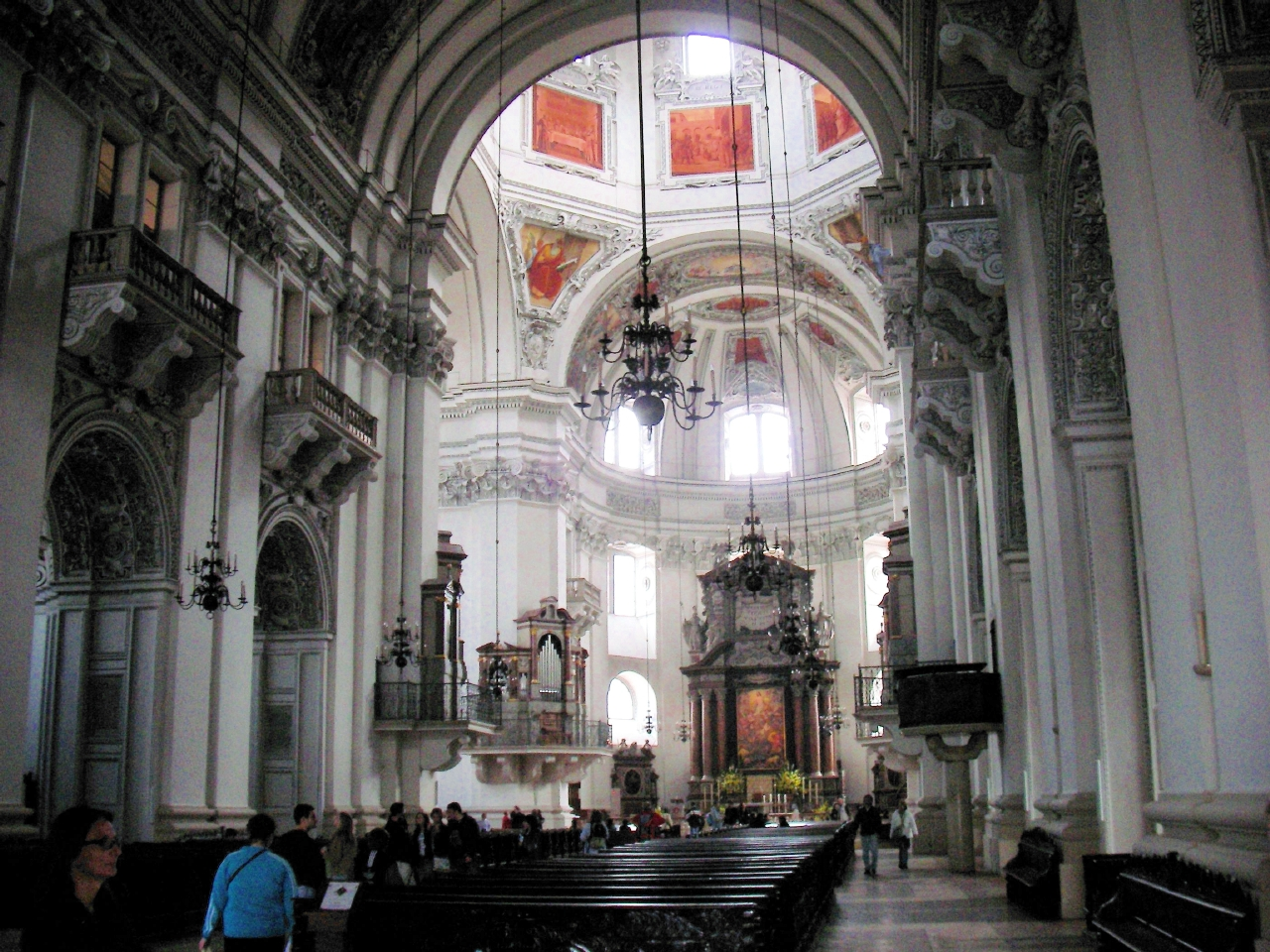 Innenansicht des Salzburger Doms vom Haupteingang / View from main entrance